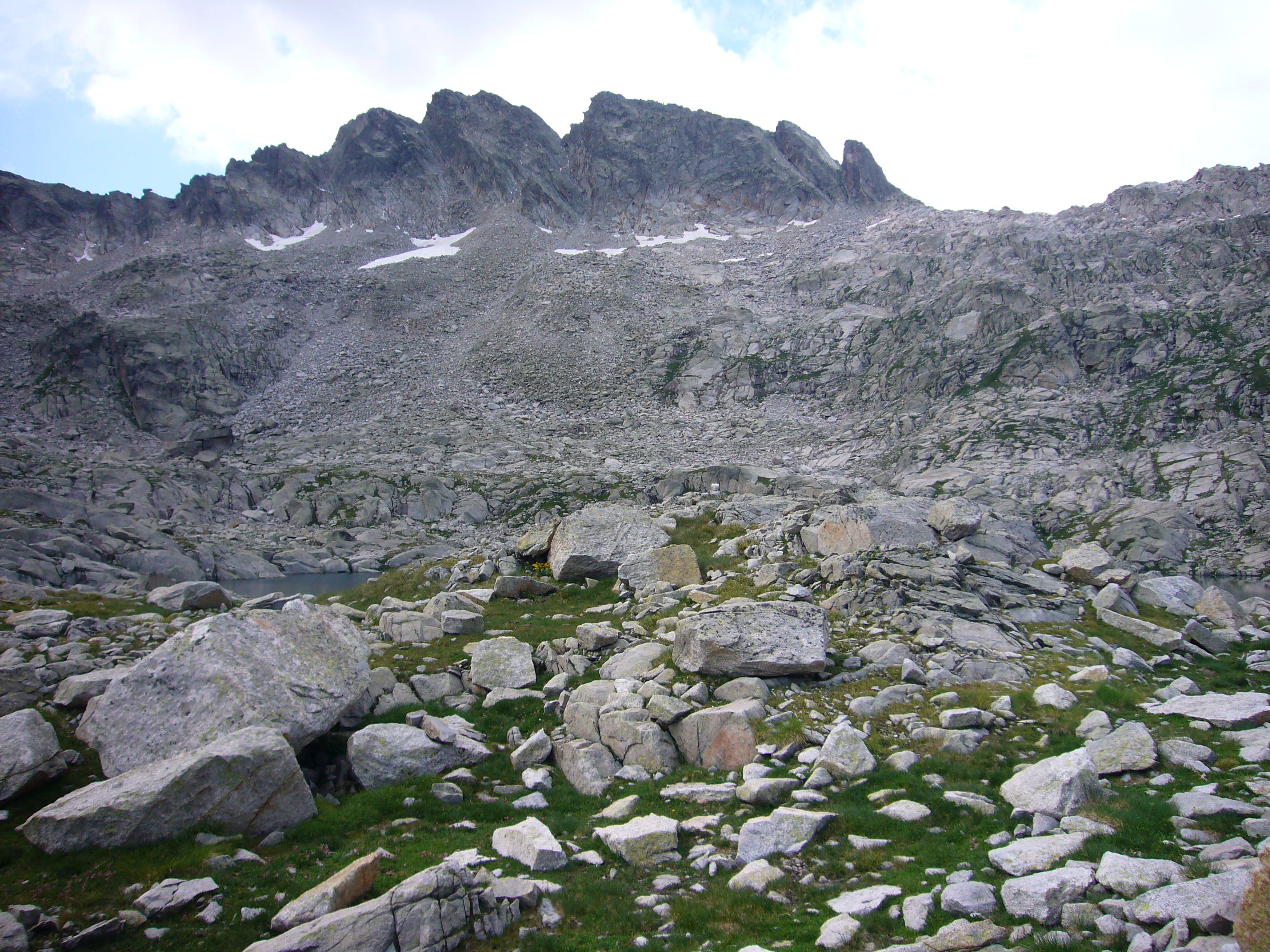 Gran Tuc de Colomèrs i Agulha deth Gran Tuc, vistos des del Lac deth Cap de Colomèrs; Naut Aran, Vall d’Aran, Catalunya